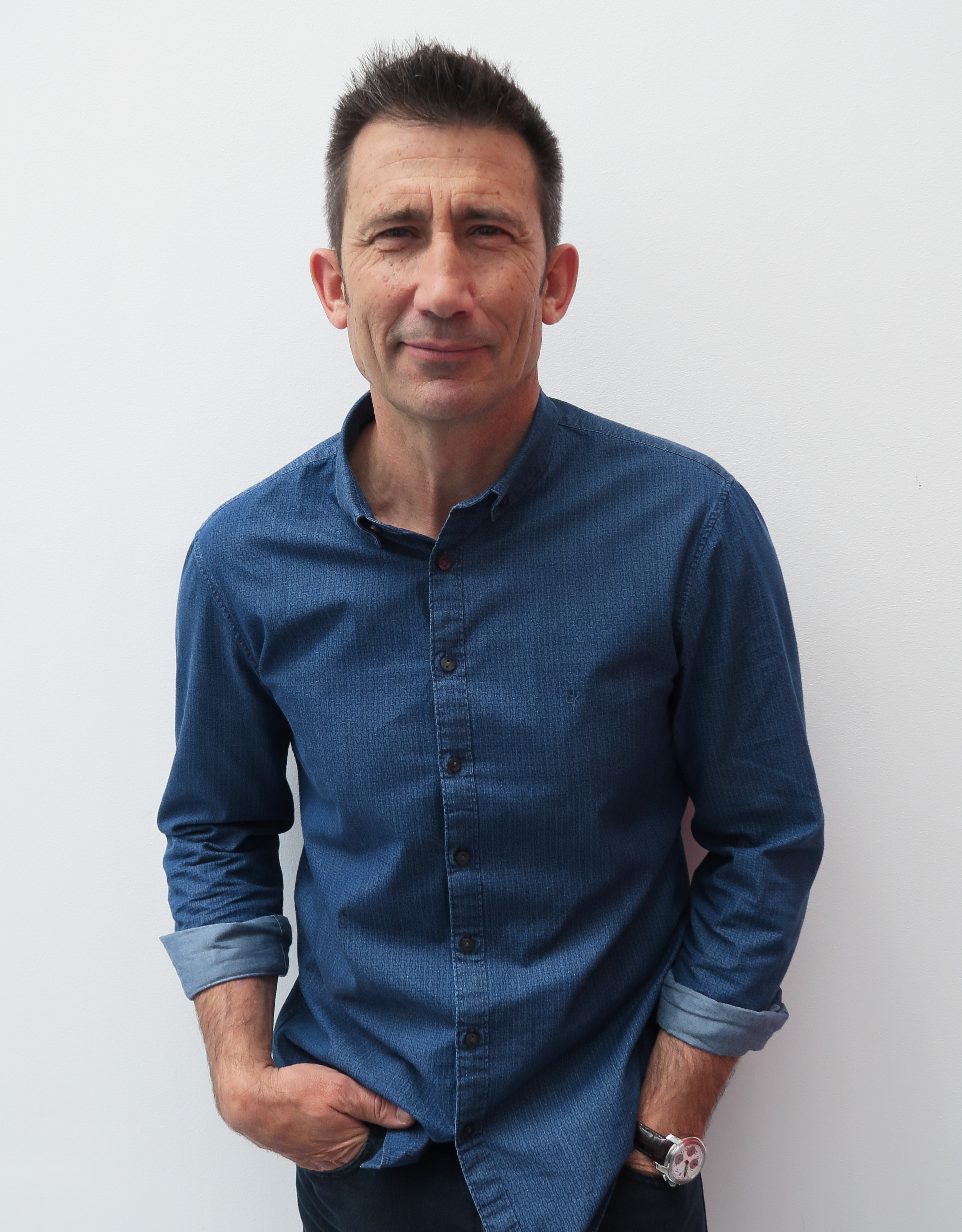 Carlos Martínez, foto para Wikipedia